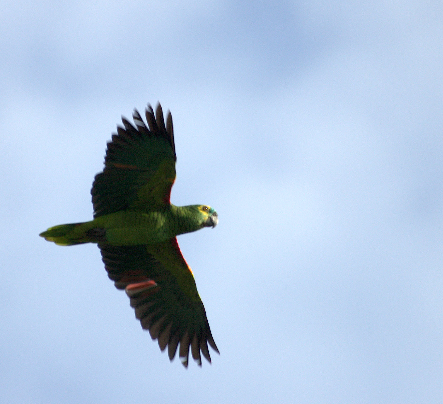 Blue-fronted Amazon (Amazona aestiva) Parque da Independência , Museu do Ipiranga, São Paulo